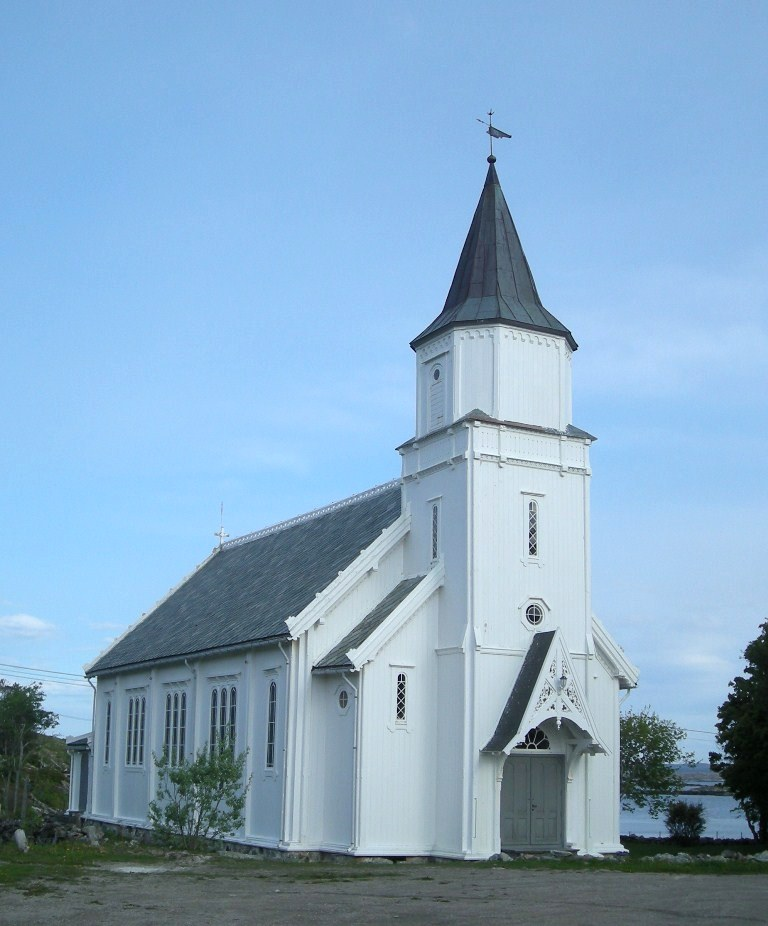 Hallaren kirke, Frøya